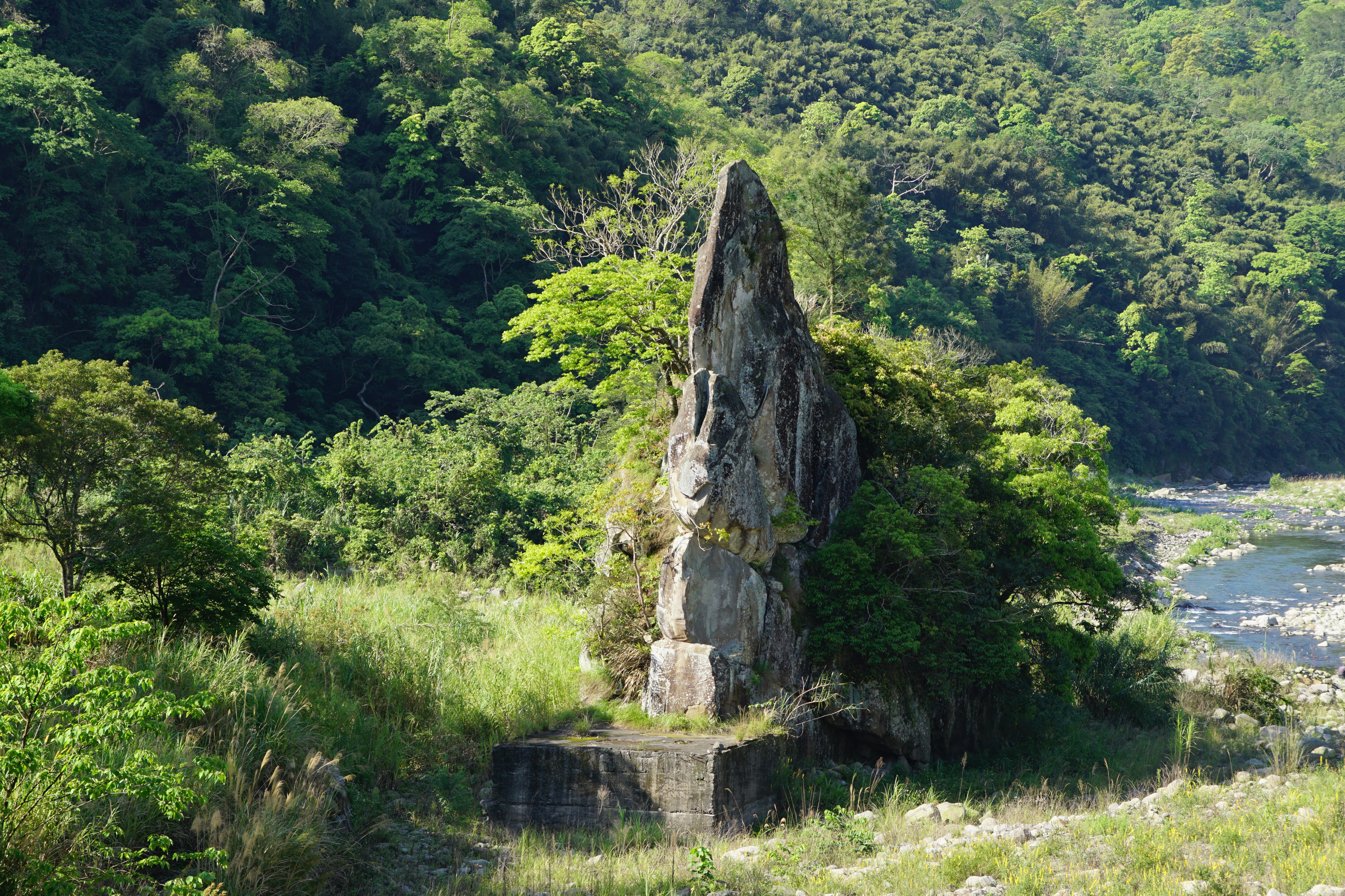 位於那羅、嘉樂兩溪匯流處的尖石岩，台灣新竹縣尖石鄉